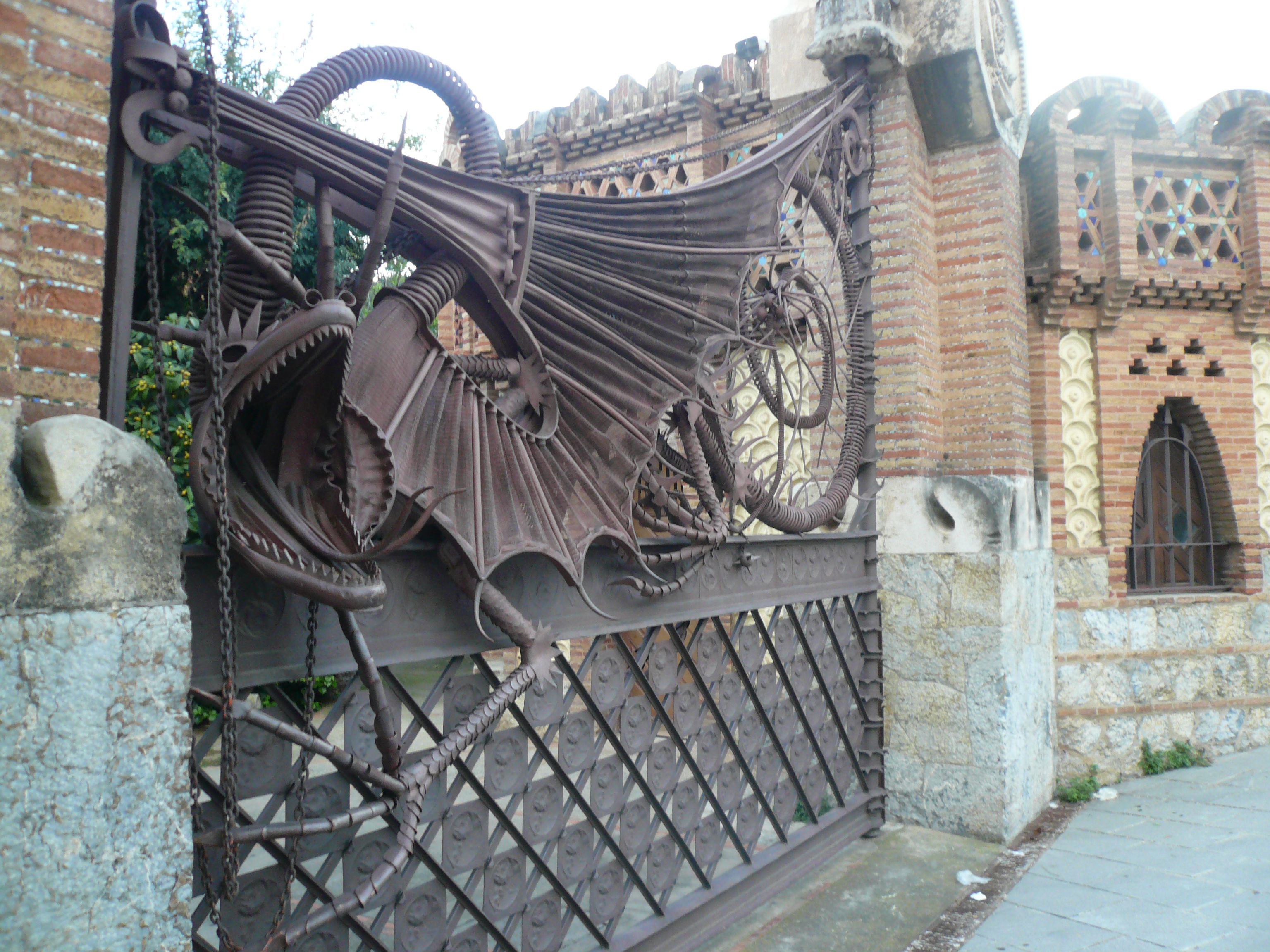 Porta del Drac i del Jardí de les Hespèrides. Av. Pedralbes (Barcelona). Disseny: Antoni Gaudí. Material: ferro forjat. 1884. 73″ N, 2° 07′ 09.52″ E